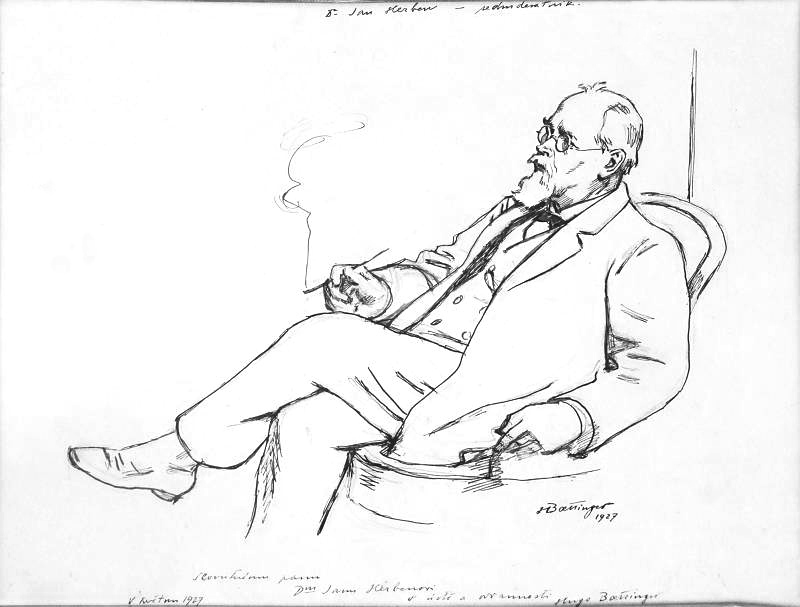 Česky: Jan Herben (kresba k 70. narozeninám)